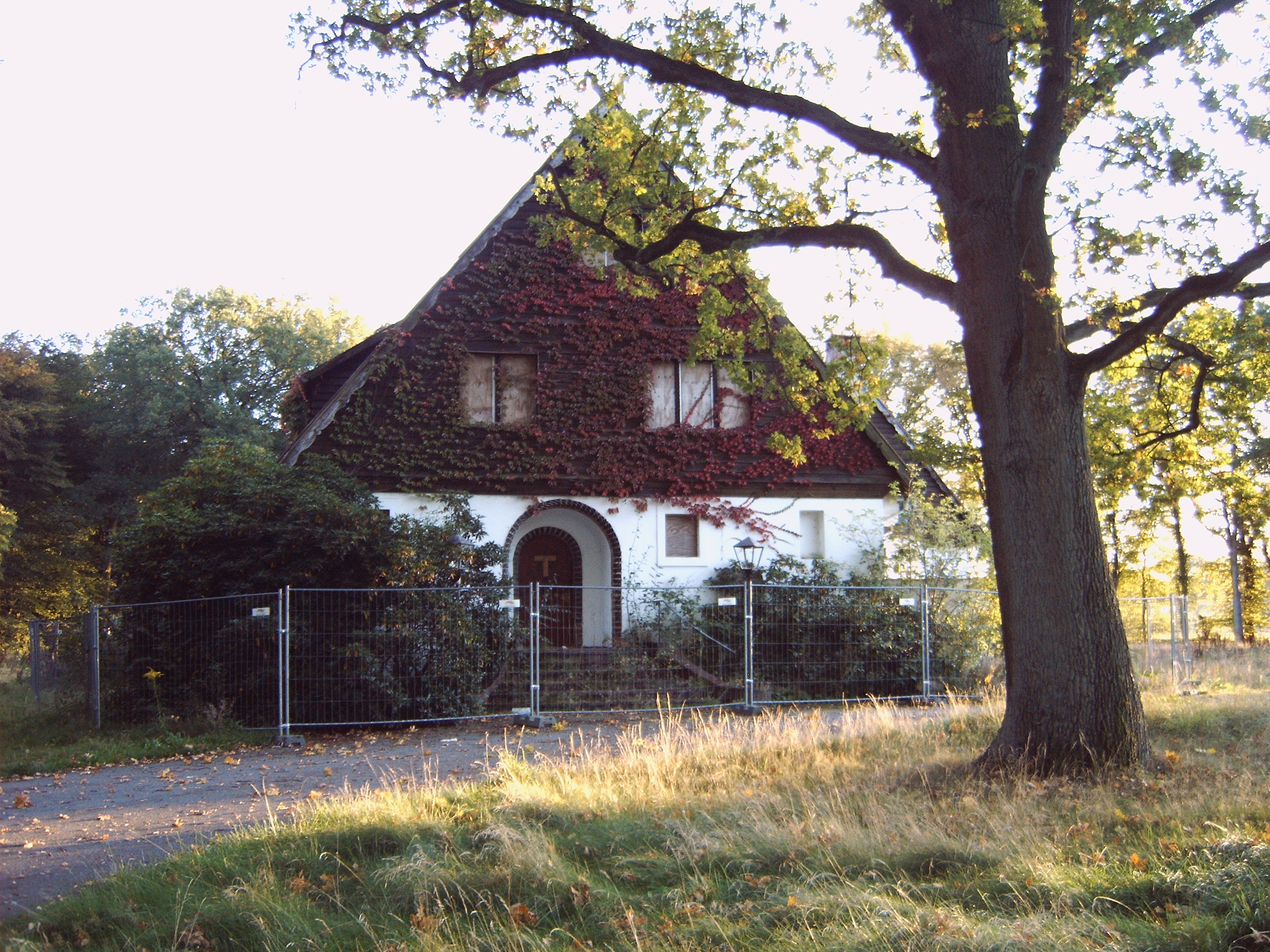 Kulturdenkmal Möllering-Villa am Wischfeld in Lüneburg-Häcklingen. Ehemaliges Hauptquartier der britischen Streitkräfte unter General Dempsey und Verhandlungsort der Kapitulation deutscher Truppen Nordwestdeutschlands, Hollands und Dänemarks Anfang Mai 1945 zwischen Feldmarschall Montgomery und deutschen Offizieren unter Generaladmiral von Friedeburg. Zustand September 2011.